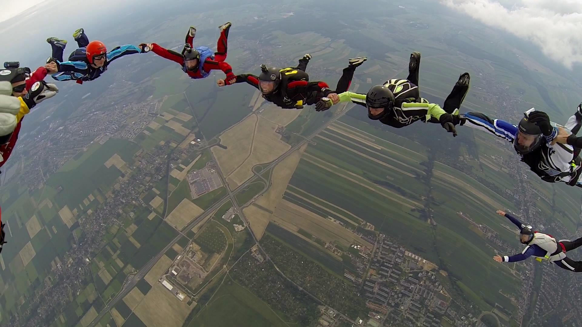 Gwiazda w wykonaniu uczestników Spadochronowych Mistrzostw Śląska 2016 po zakończonej rywalizacji — Sekcja Spadochronowa Aeroklubu Gliwickiego